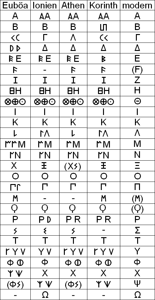 Antike epichorische Varianten des griechischen Alphabets aus Euböa, Ionien, Athen und Korinth